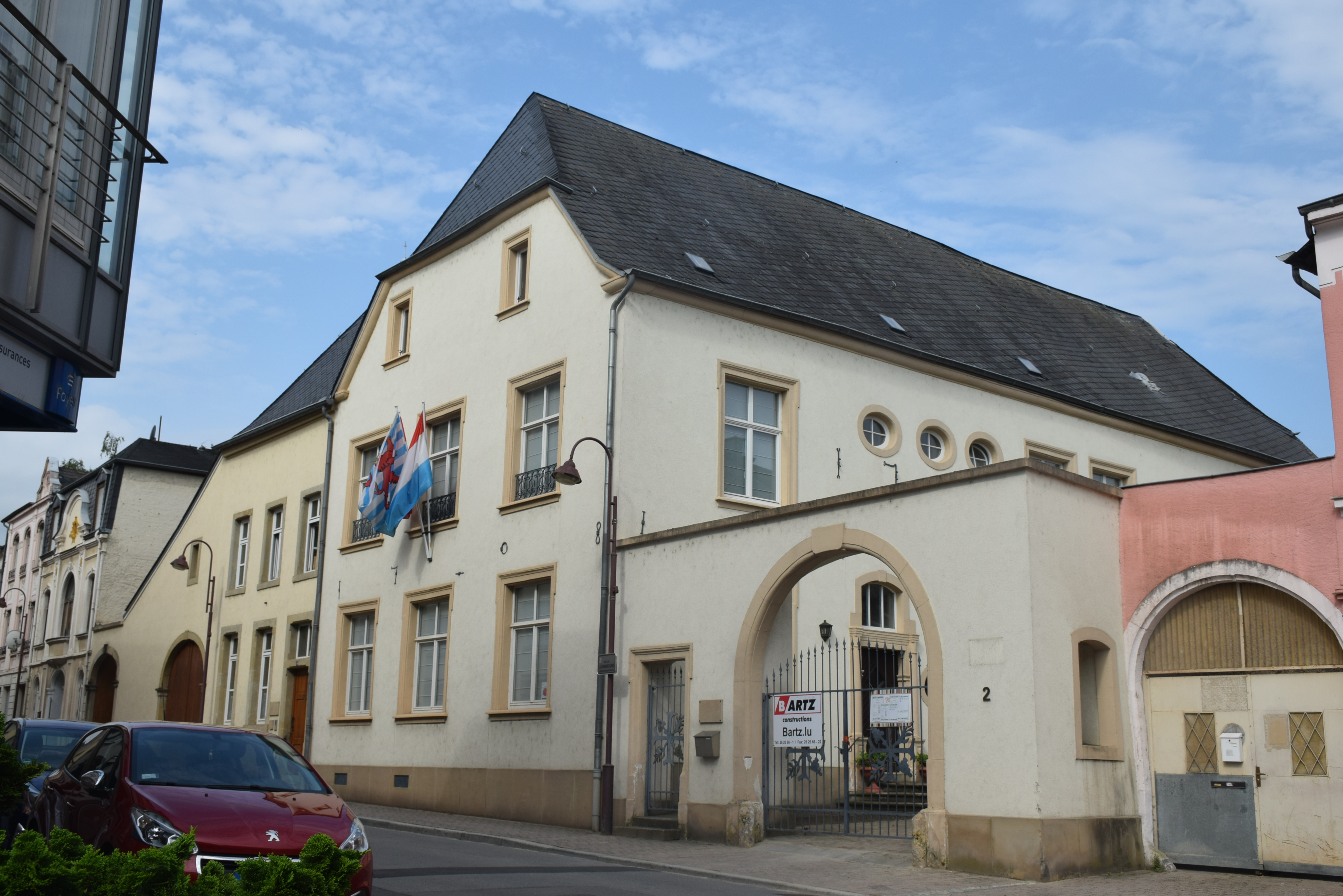 Grevenmacher: la maison décanale, sise 2, rue de Luxembourg, et la maison vicariale, sise 4, rue de Luxembourg.